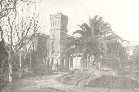 EDIFICIO FACULTAD FISICOMATEMATICAS